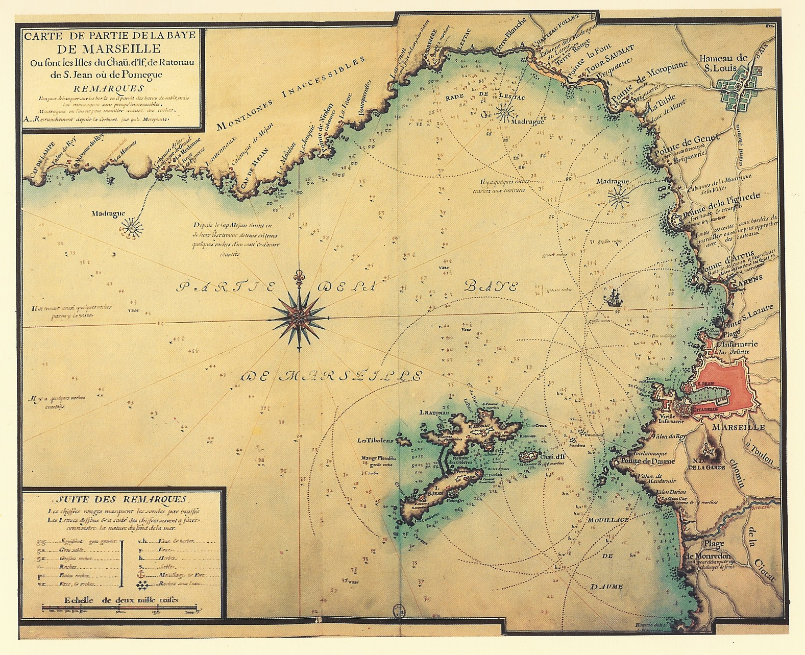 Carte de la fin du XVIIe siècle montrant l'Archipel du Frioul et la baie de Marseille. Bibliothèque Nationale, Cabinet des estampes. 1690 (vers)